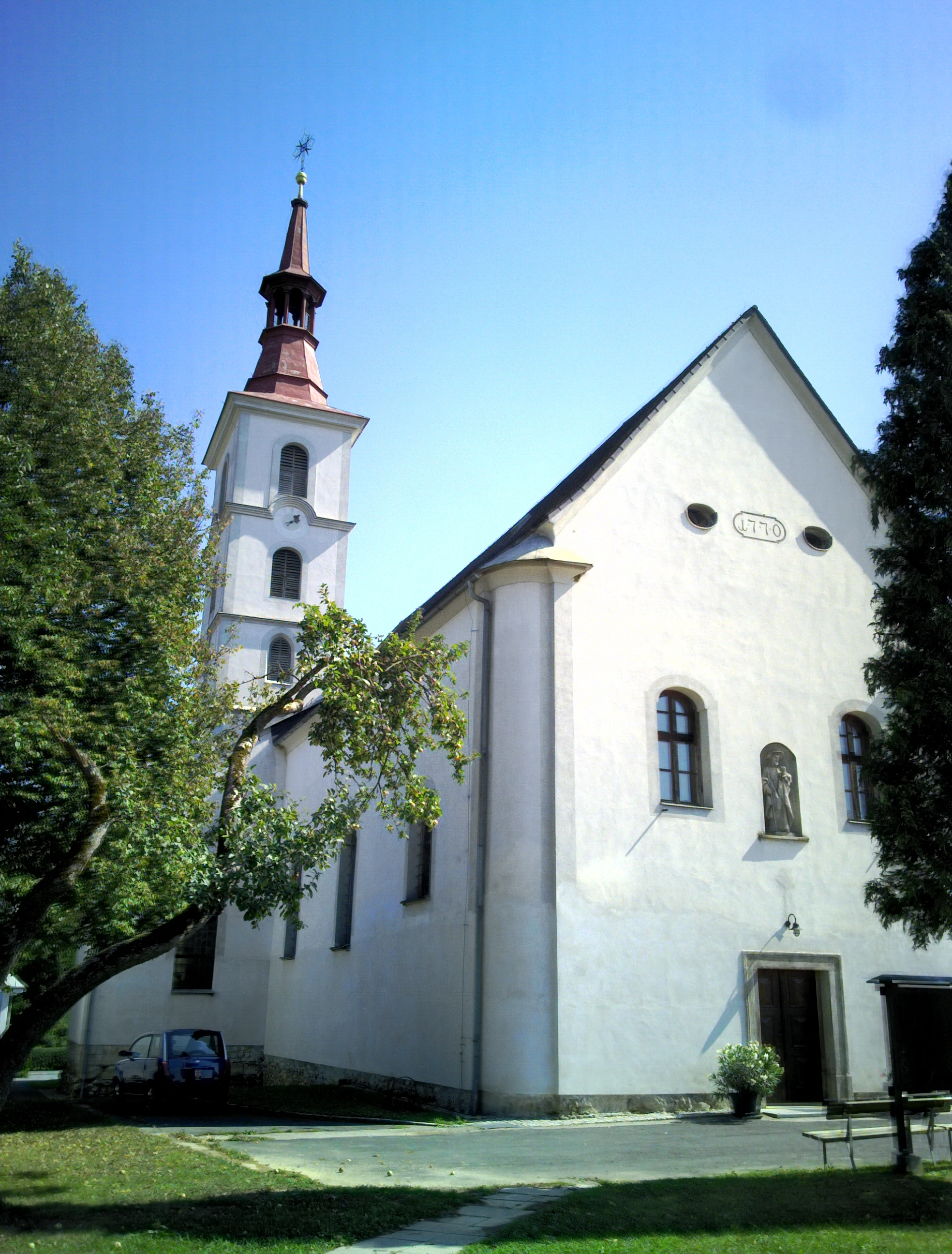 Kath. Pfarrkirche, St. Peter